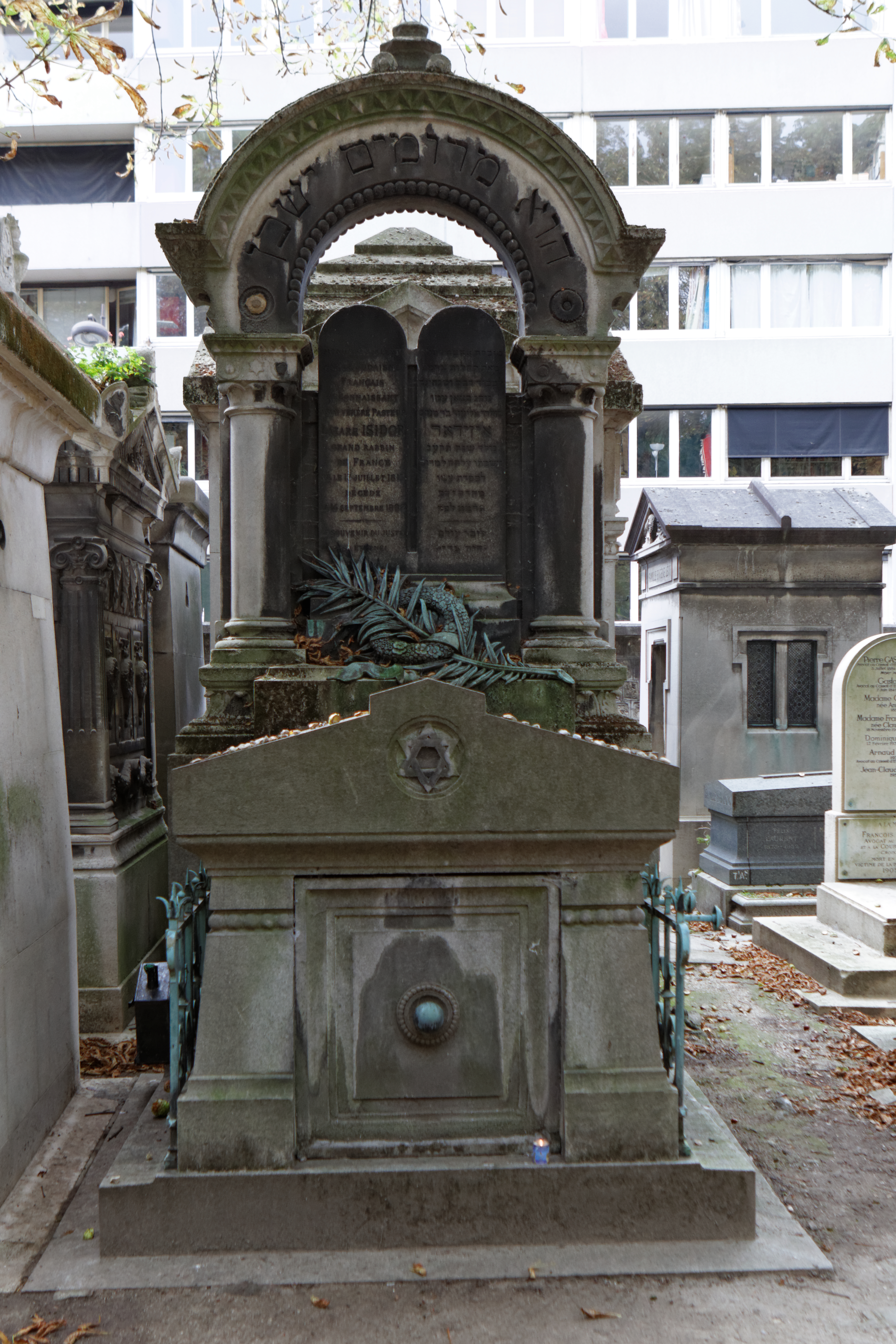 Sépulture du grand rabbin de France Lazare Isidor (1813-1888).